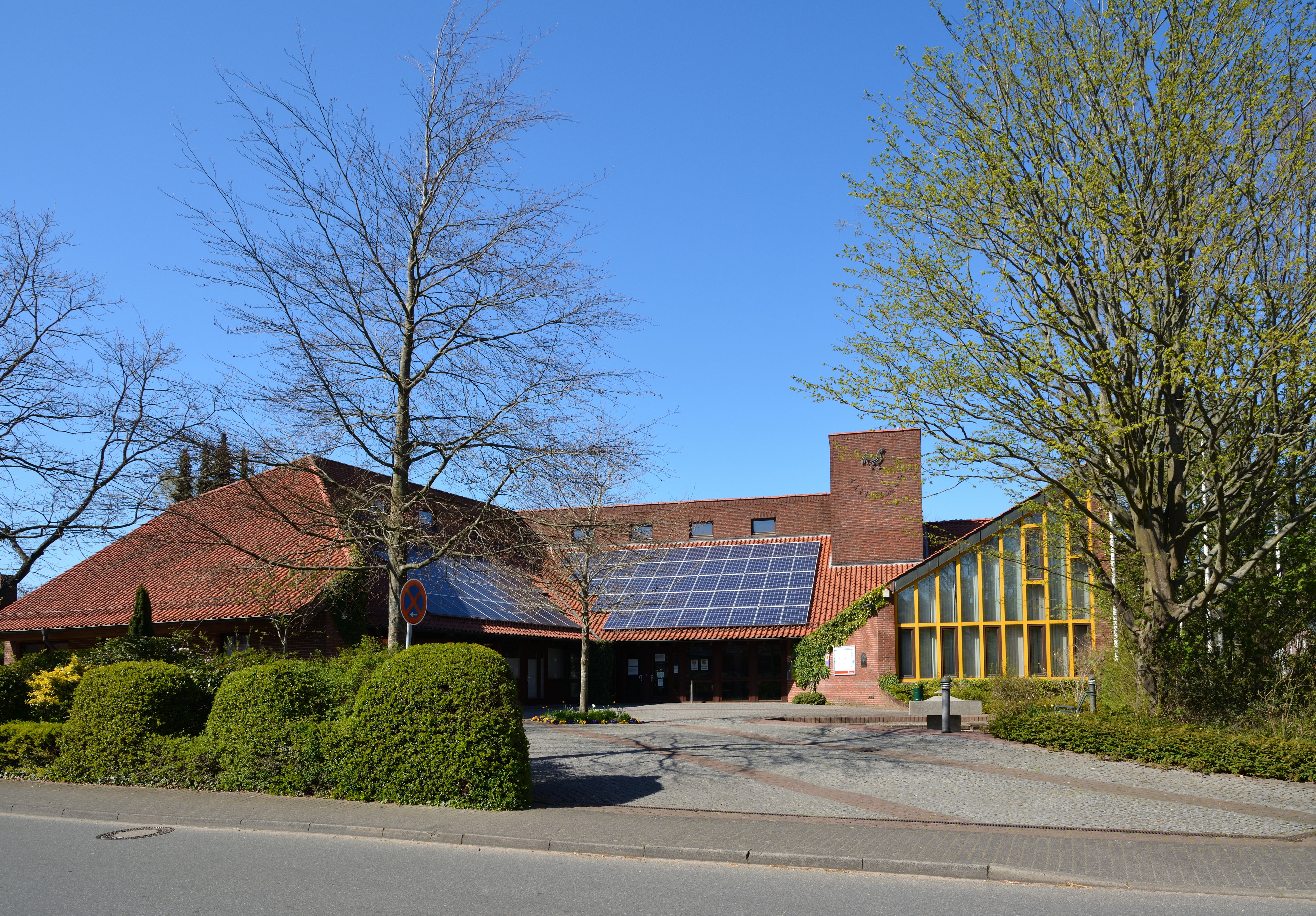 Das Amtsgebäude des Amtes Schenefeld in Schenefeld